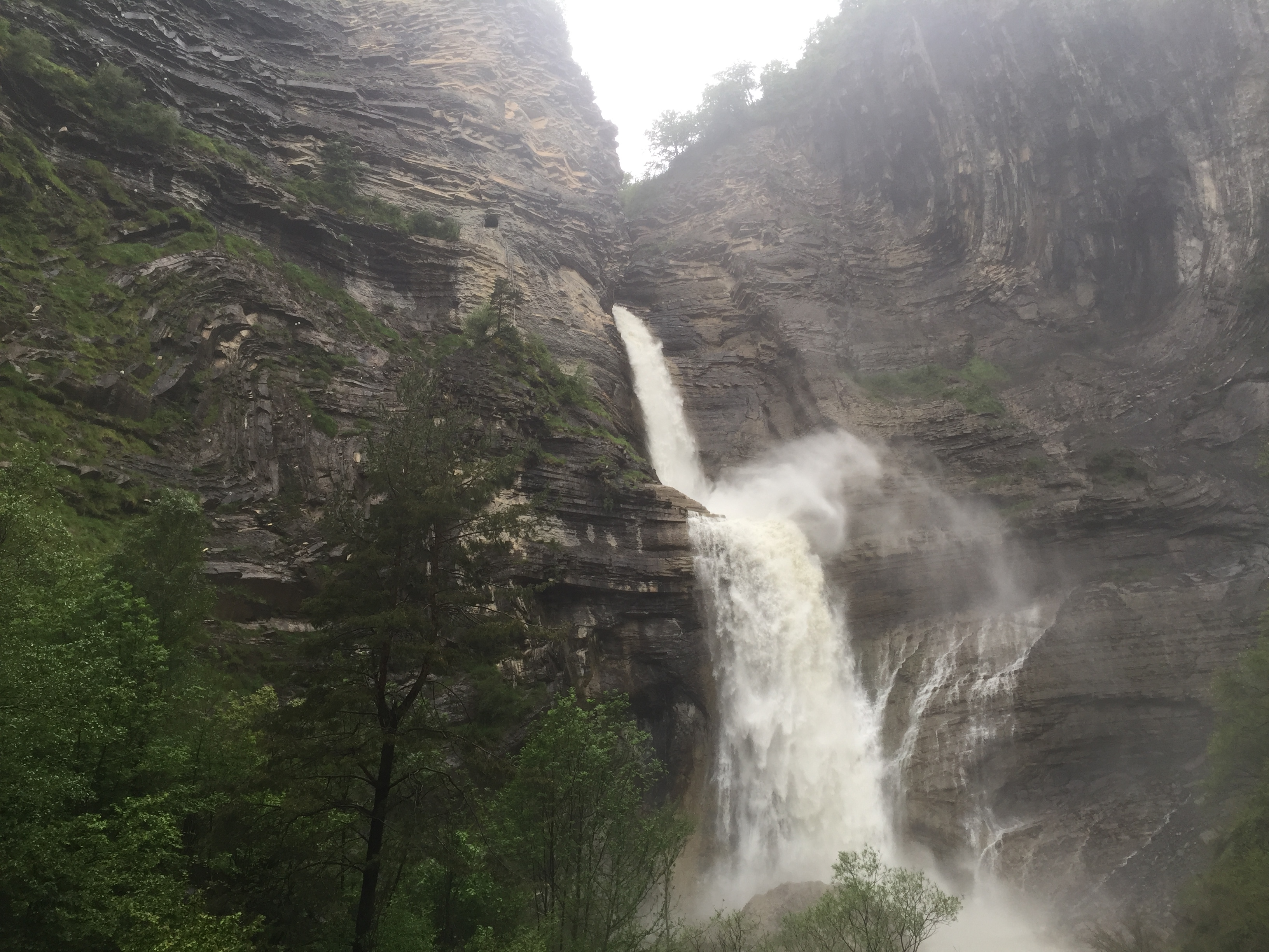 Barranco, Cascada y Via Ferrata del Sorrosal. Desembocadura en el Rio Ara. Broto (Huesca)